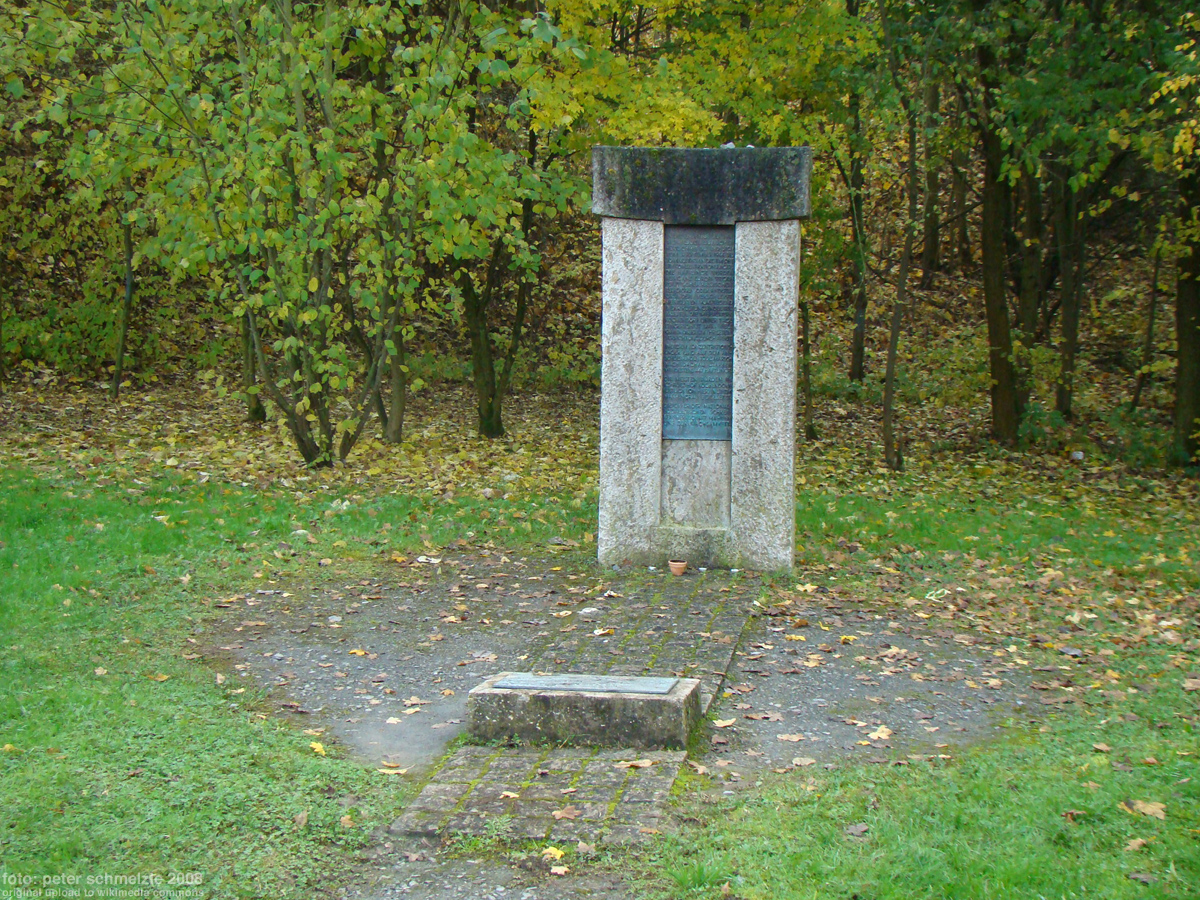 Mahnmal auf dem ehemaligen Areal des KZ Kochendorf.